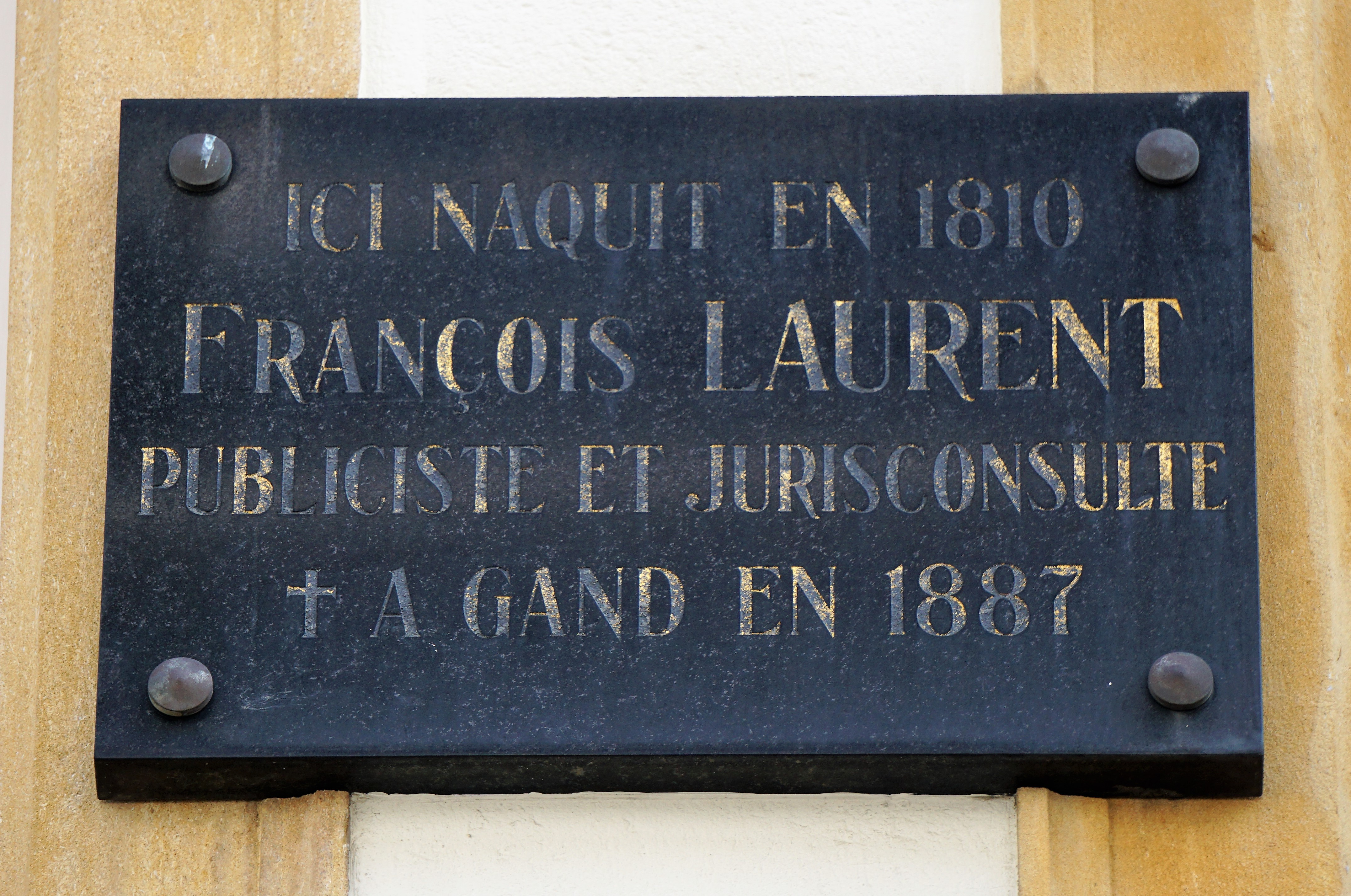 Luxembourg: Plaque en mémoire de François Laurent, né le 8 juillet 1810 dans la maison 5 de la rue Philippe-II.